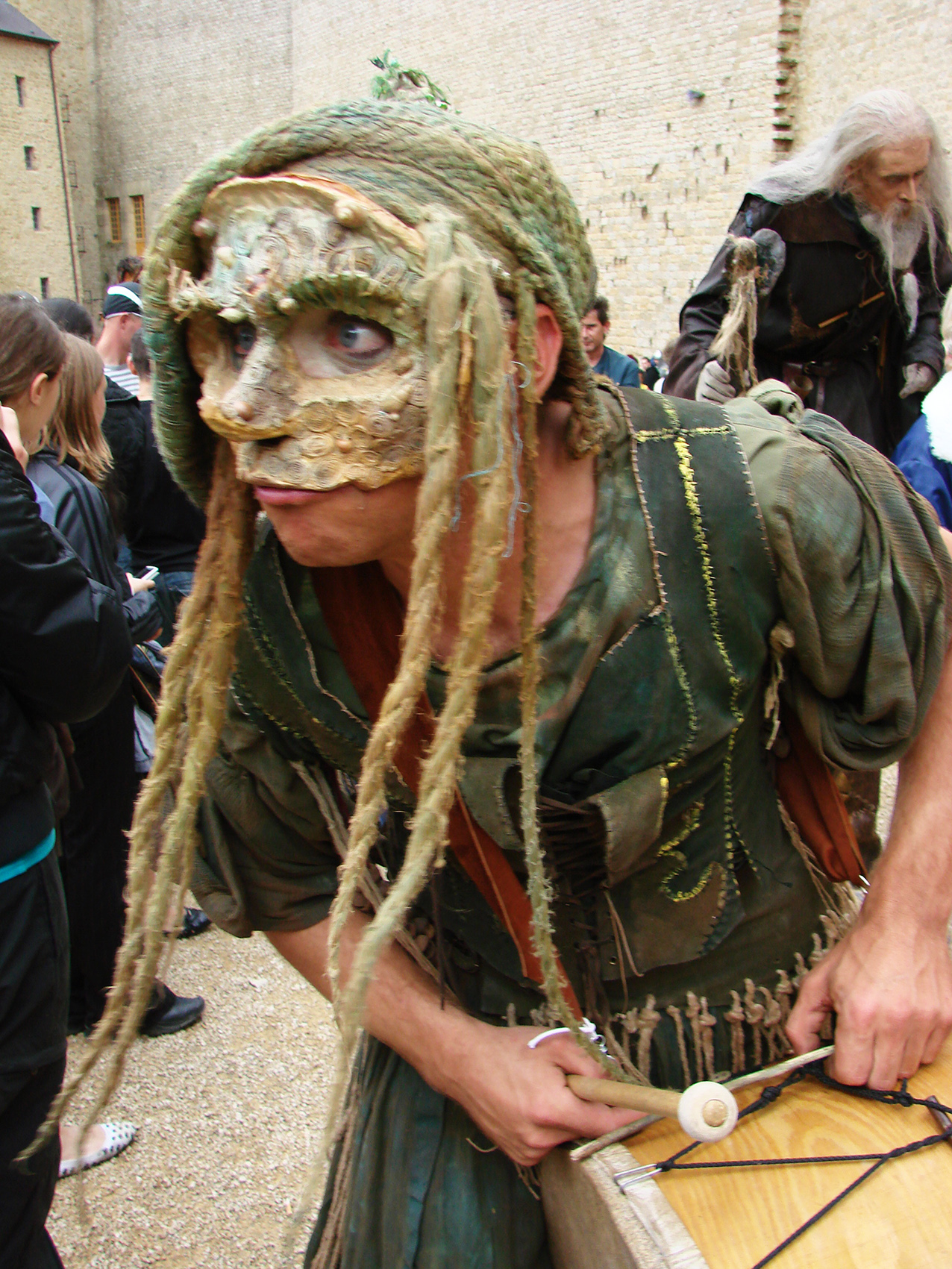 Artiste de la compagnie Entr'act Ouroboros,au festival médiéval de Sedan (08 France),le 20 Mai 2007.